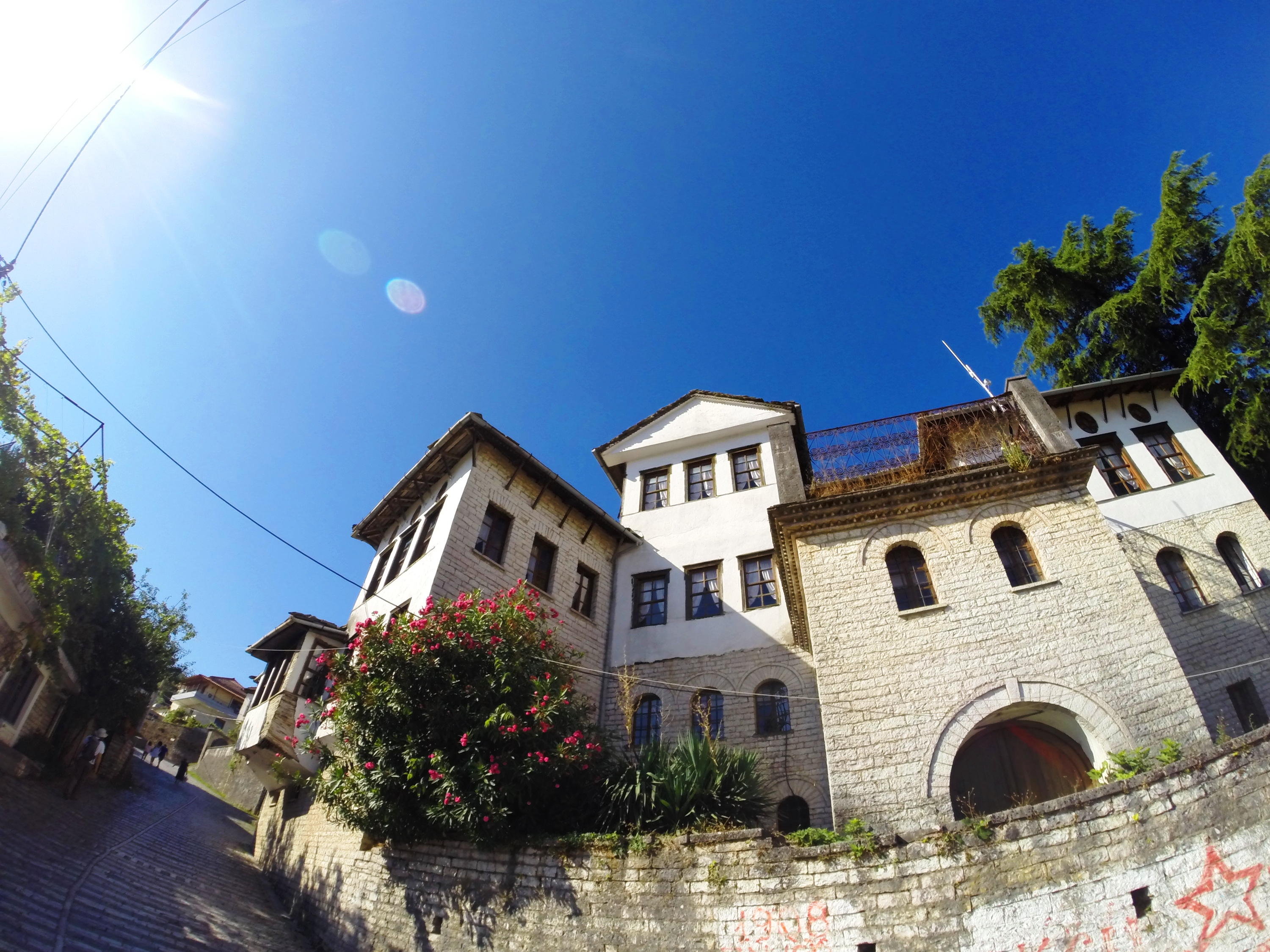 Shtëpia e enver Hoxhës